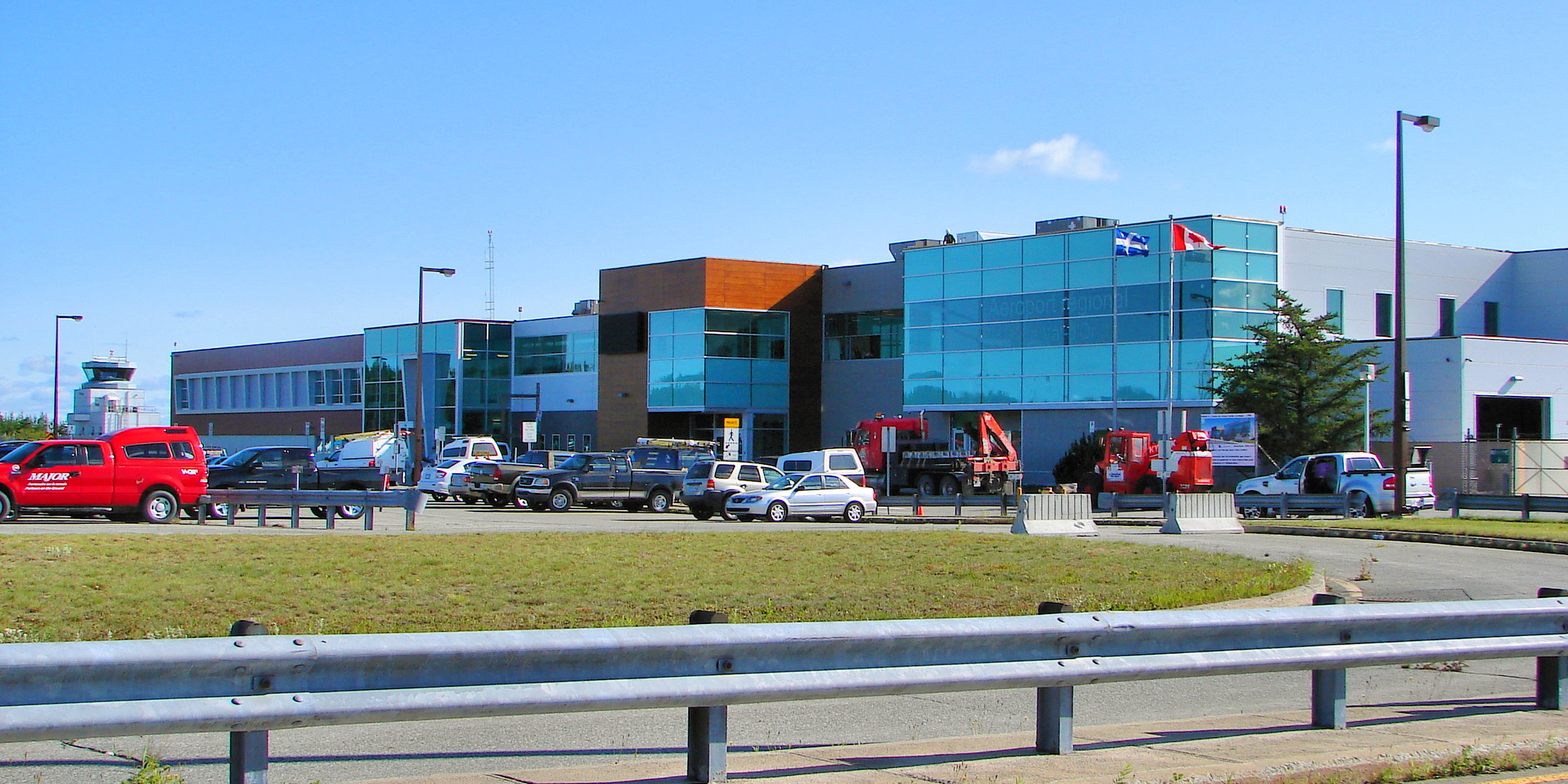 Val-d'Or Airport, Quebec, Canada